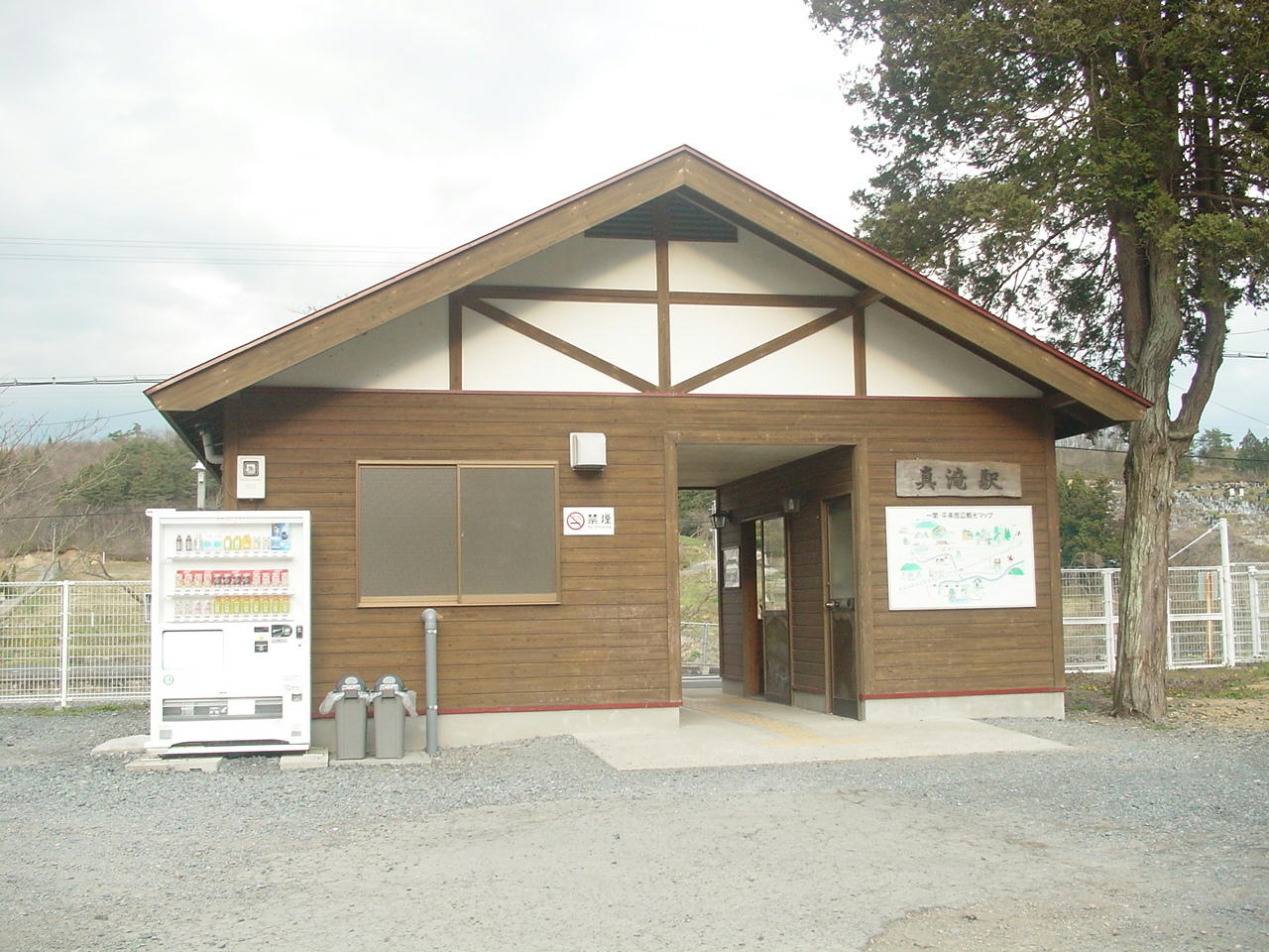 （真滝駅）